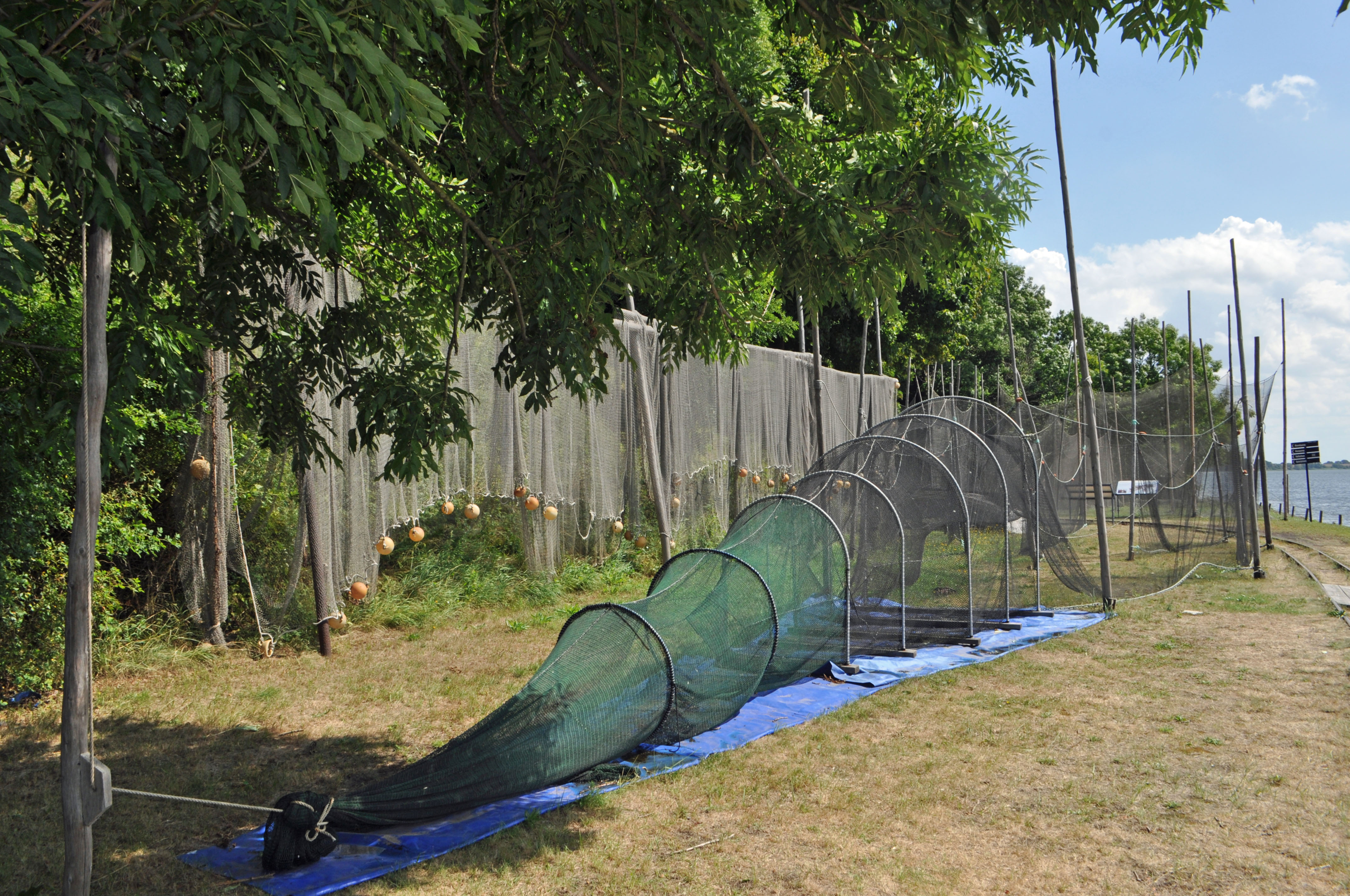 Auf dem Gelände des Nautineums auf dem Dänholm in Stralsund. Beschreibung siehe Dateiname.